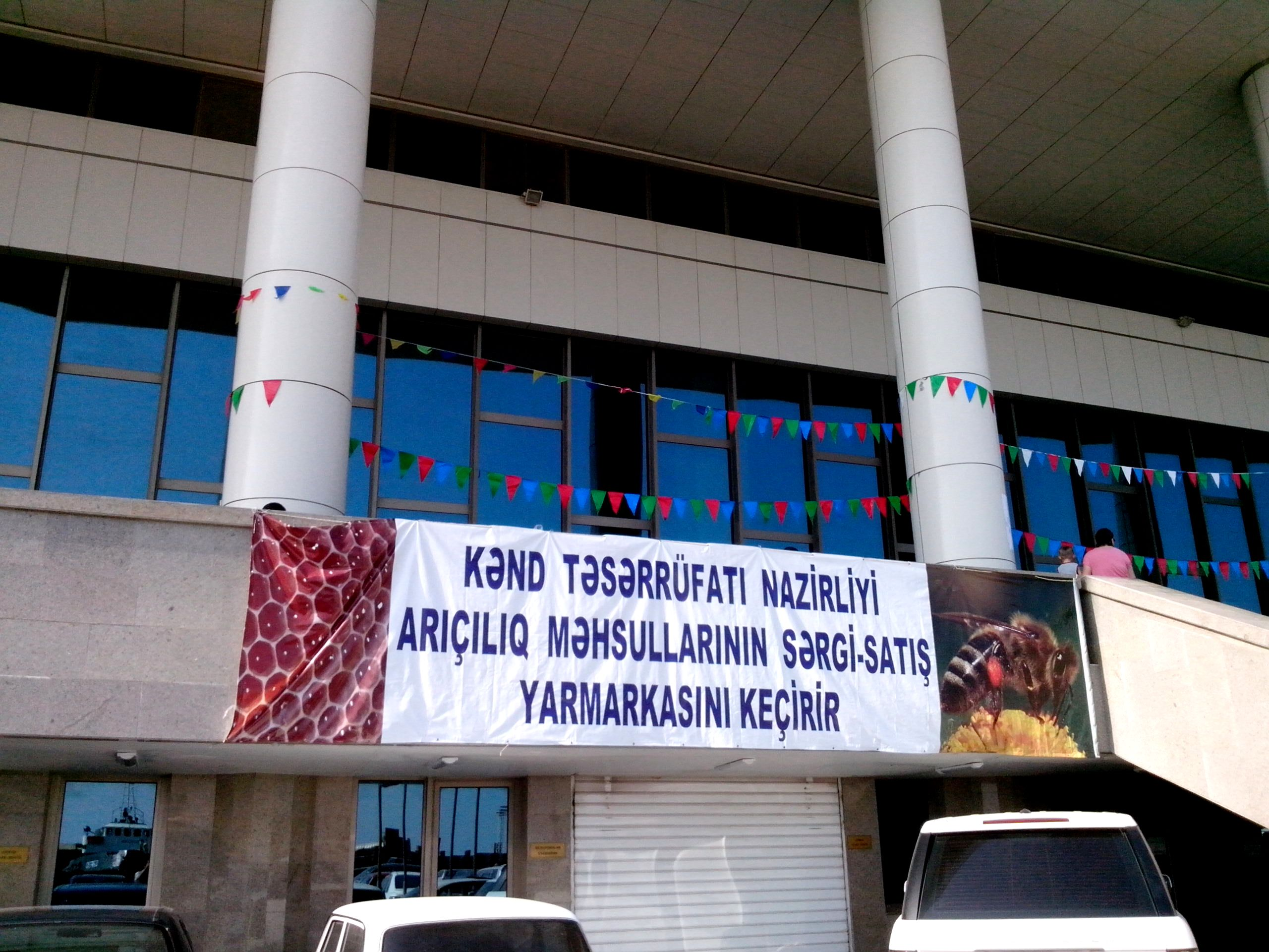 Arıçılıq məhsullarının Sərgi-Satış Yarmarkası - 2013